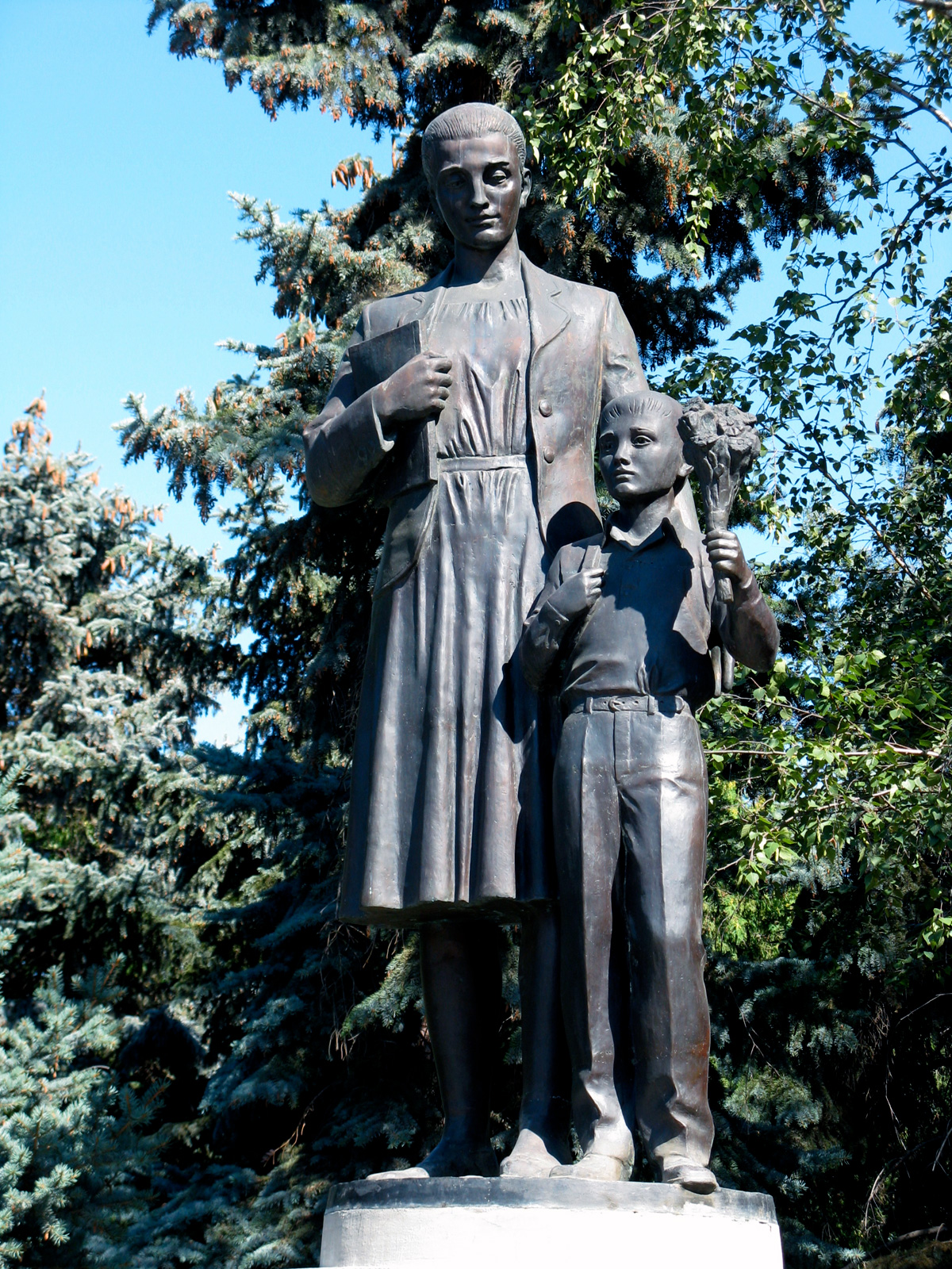 памятник «Первой учительнице» в посёлке Матвеев-Курган (Ростовская область)